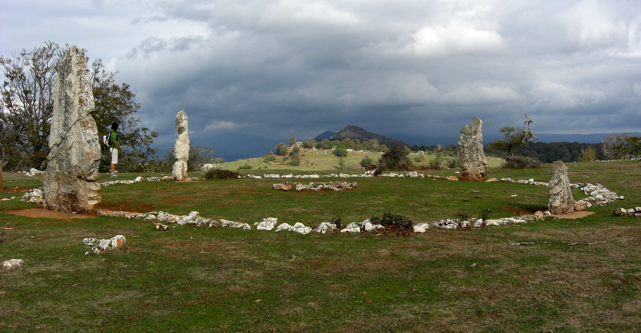 Entziako mendilerroan (Araba) dagoen Mendiluze harrespila